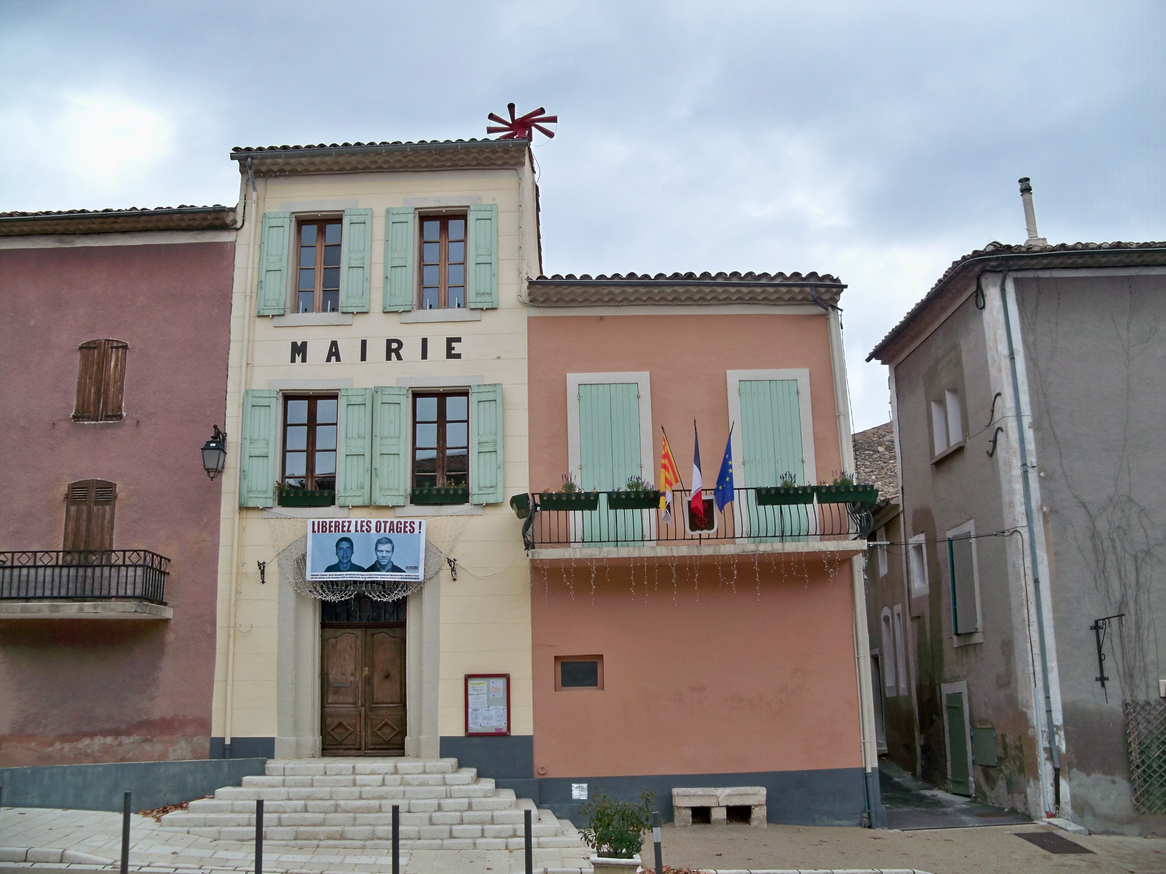 Mairie à Céreste, Alpes de Haute Provence, France